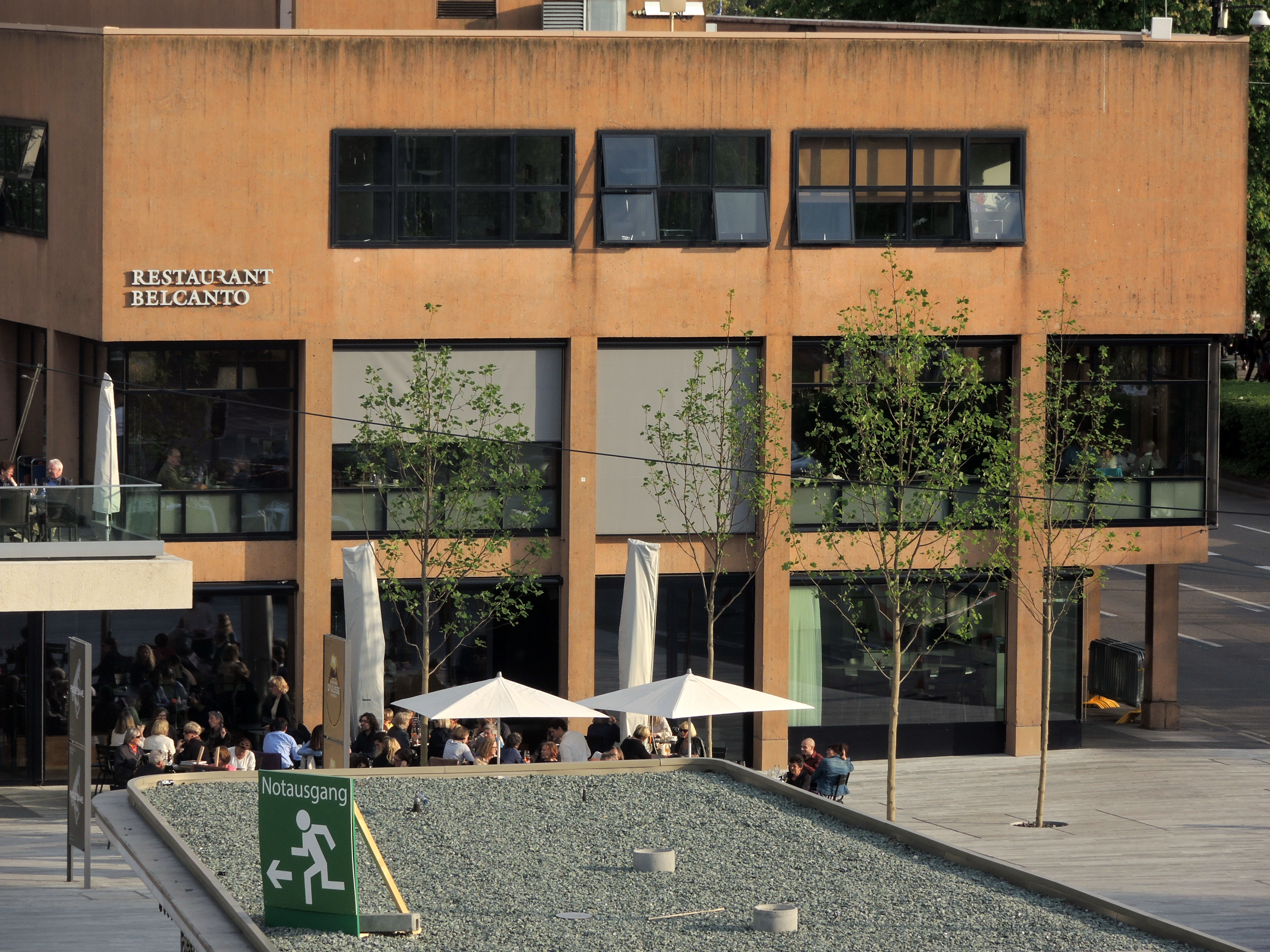 Sechseläuten 2014 : Sechseläutenplatz-«fäscht» in Zürich (Switzerland)